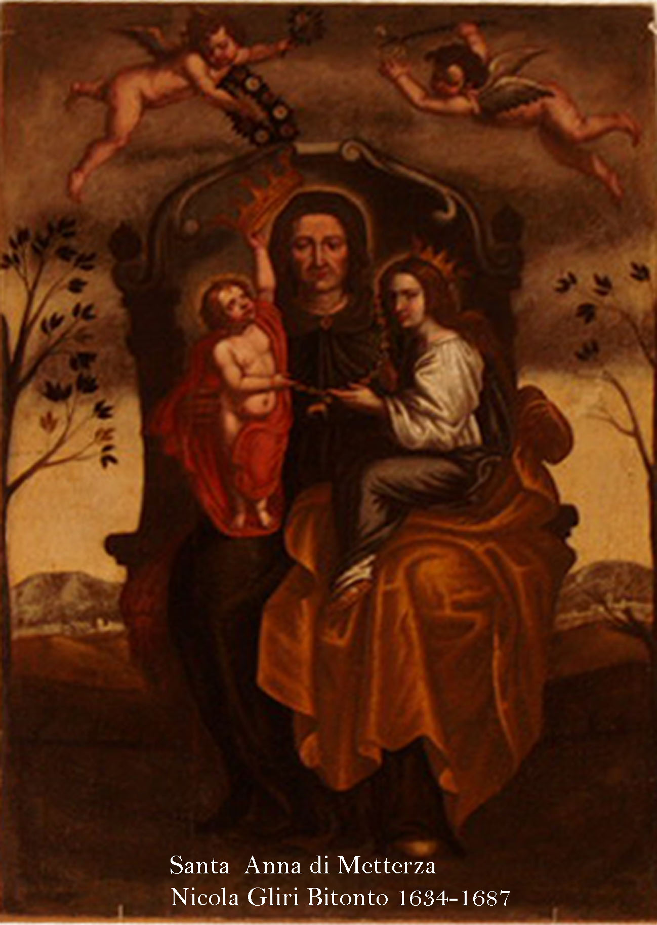 Il dipinto, ascrivibile alla seconda metà del 1600, è un olio su tela che misura cm 160 X cm 109 e, raffigura Sant'Anna in trono avente in grembo da sinistra il piccolo Gesù ed a destra Maria bambina, con cornice coeva realizzata in legno intagliato e dorato a foglia. Collocato sulla parete sinistra del Presbiterio della Chiesa Santa Maria Vetere - Andria (BT)